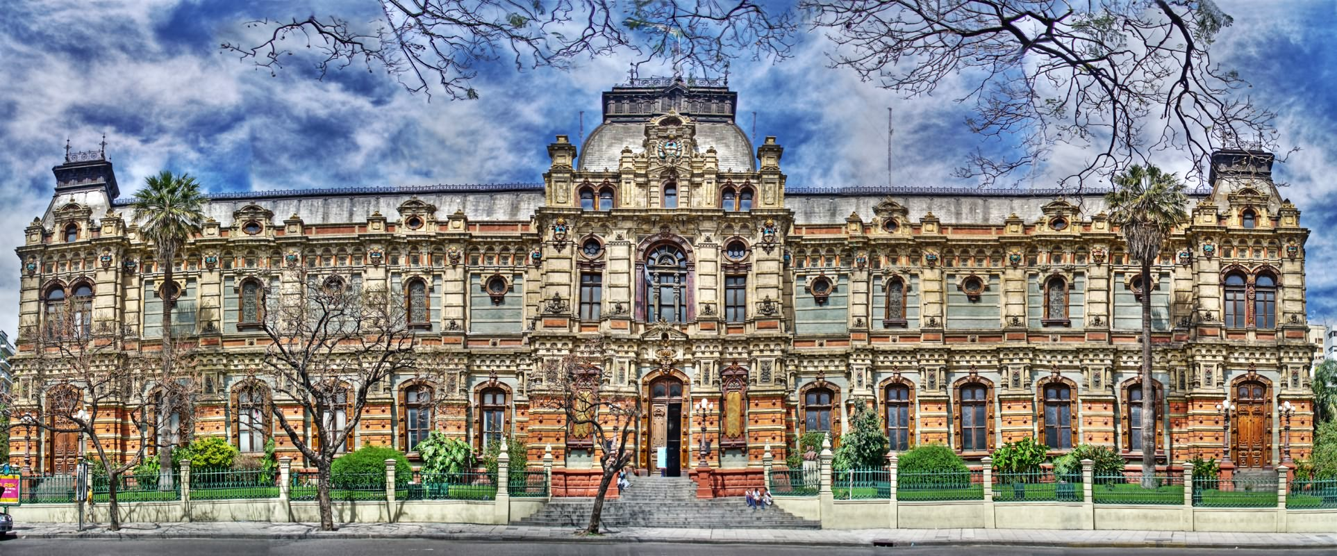 Buenos Aires, Argentina. Ocupa toda la manzana de las calles Córdoba, Ríobamba, Viamonte y Ayacucho. Es un enorme palacio construido originalmente para almacenar 72.700.000 litros de agua por día, y en cuyo interior no existen casi habitaciones. Actualmente funciona como edificio de oficinas. View On Black